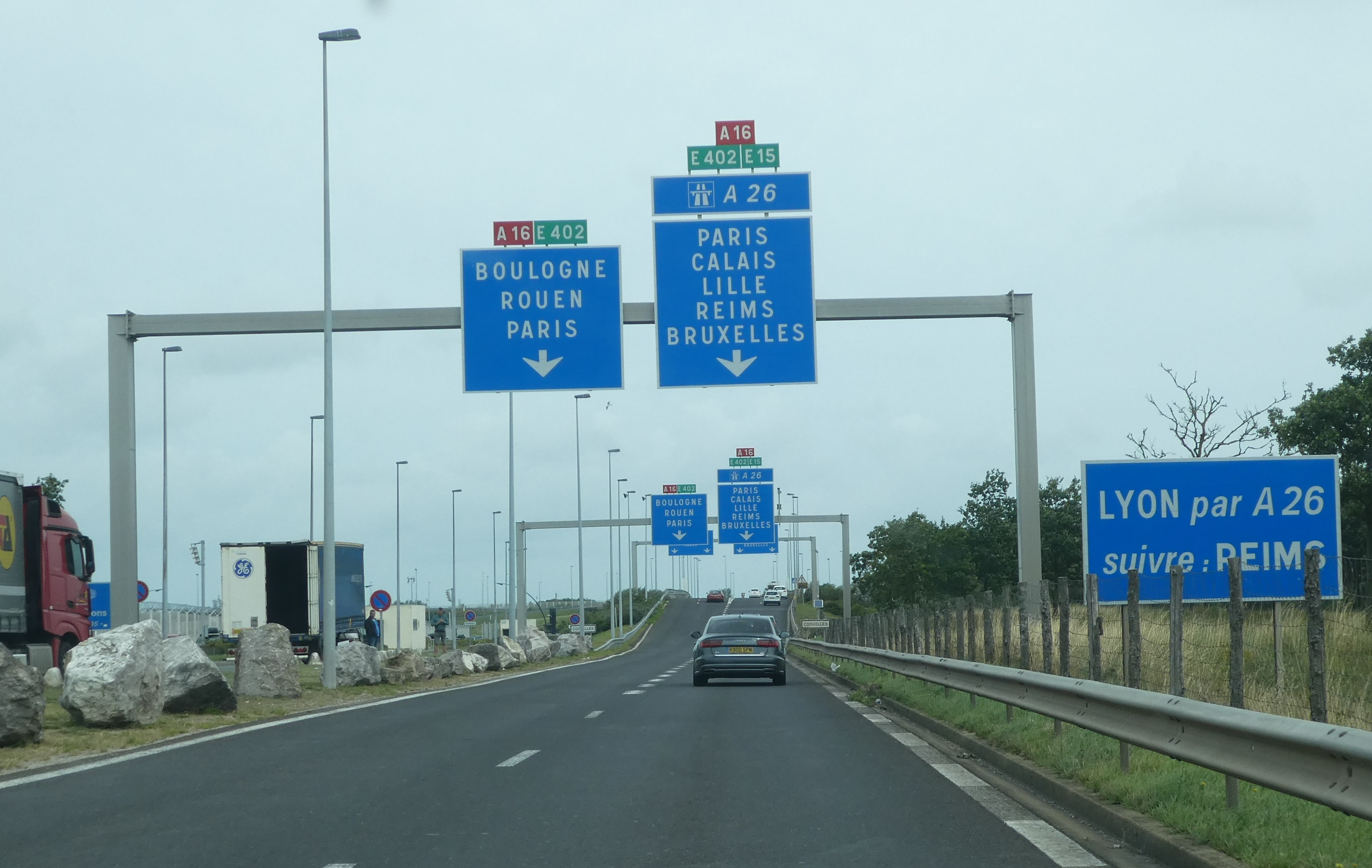 Echangeur Eurotunnel : retour sur la A16 à la sortie du shuttle